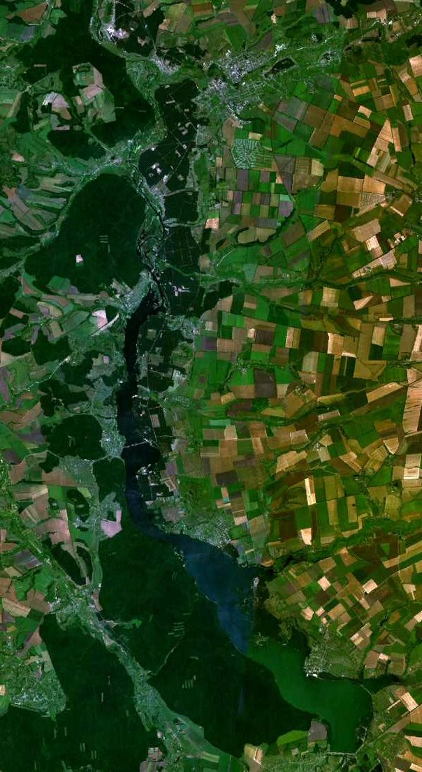 Pechenezhskoe vodochranilische on Severskii Donetz